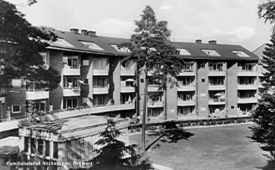 Nockeby familjehotell i Bromma